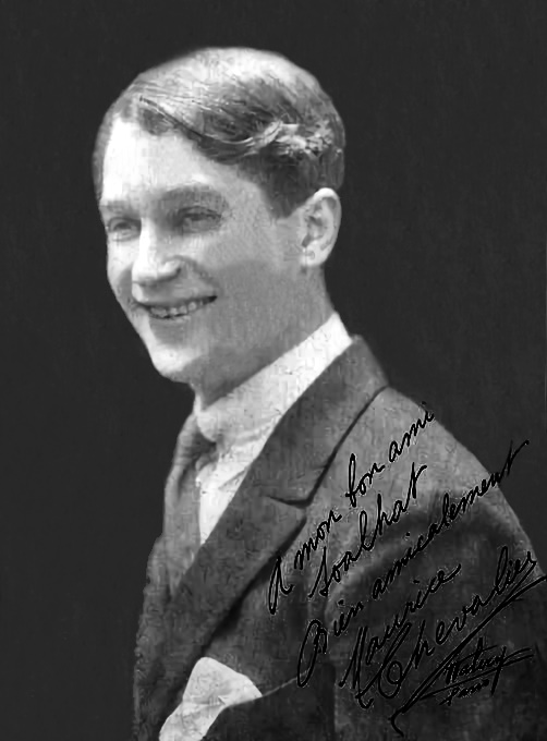 CHEVALIER Maurice [Paris, 1888 - id., 1972], chansonnier français. Photographie de jeunesse dédicacée (cliché aussi signé par le photographe Walery-Paris).